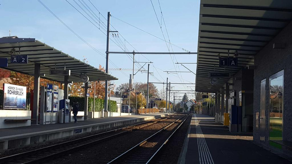 Buchs AG, Bahnhof, WSB AAR bus+bahn, Blick von Aarau kommend